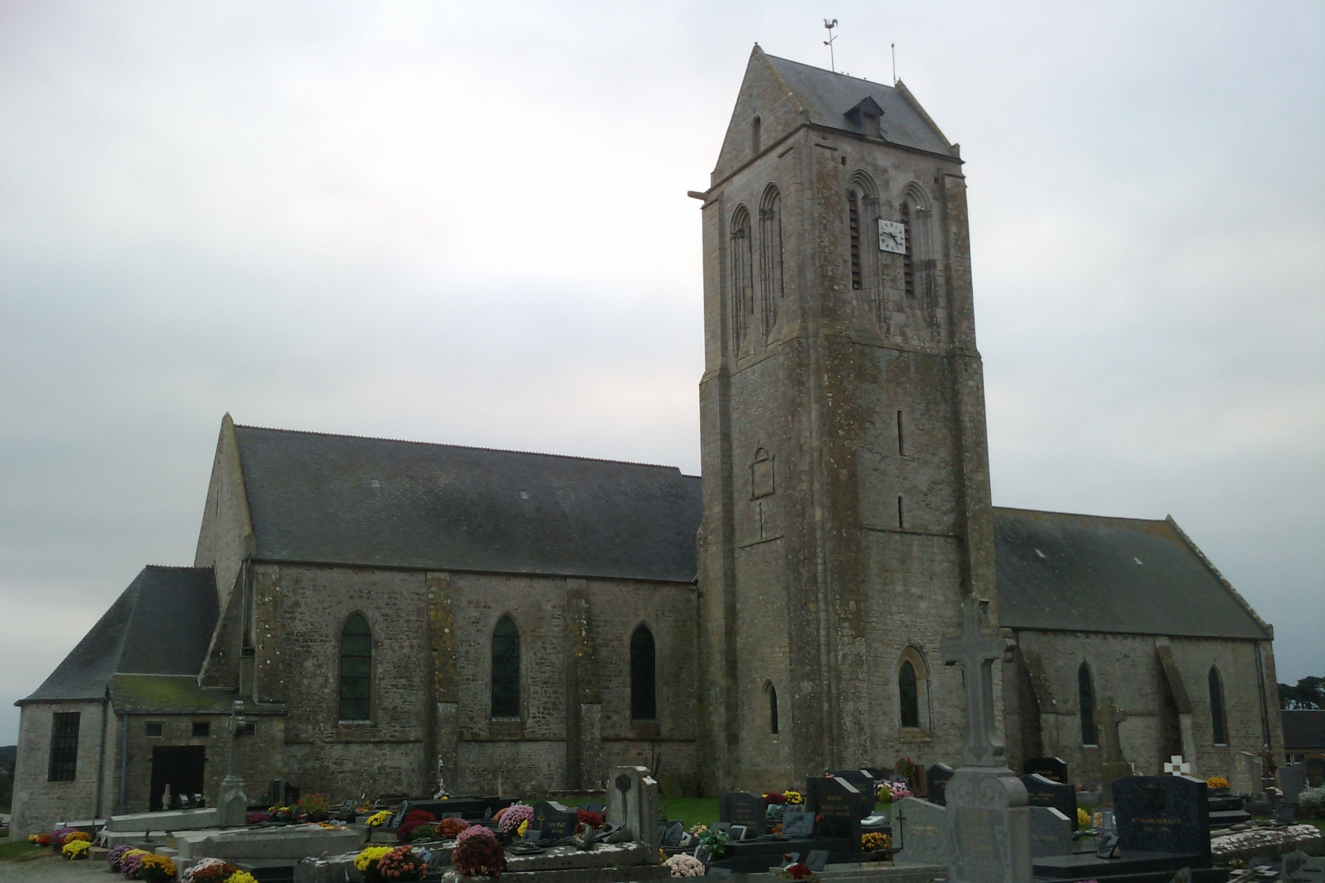 Église Notre-Dame d'Orglandes